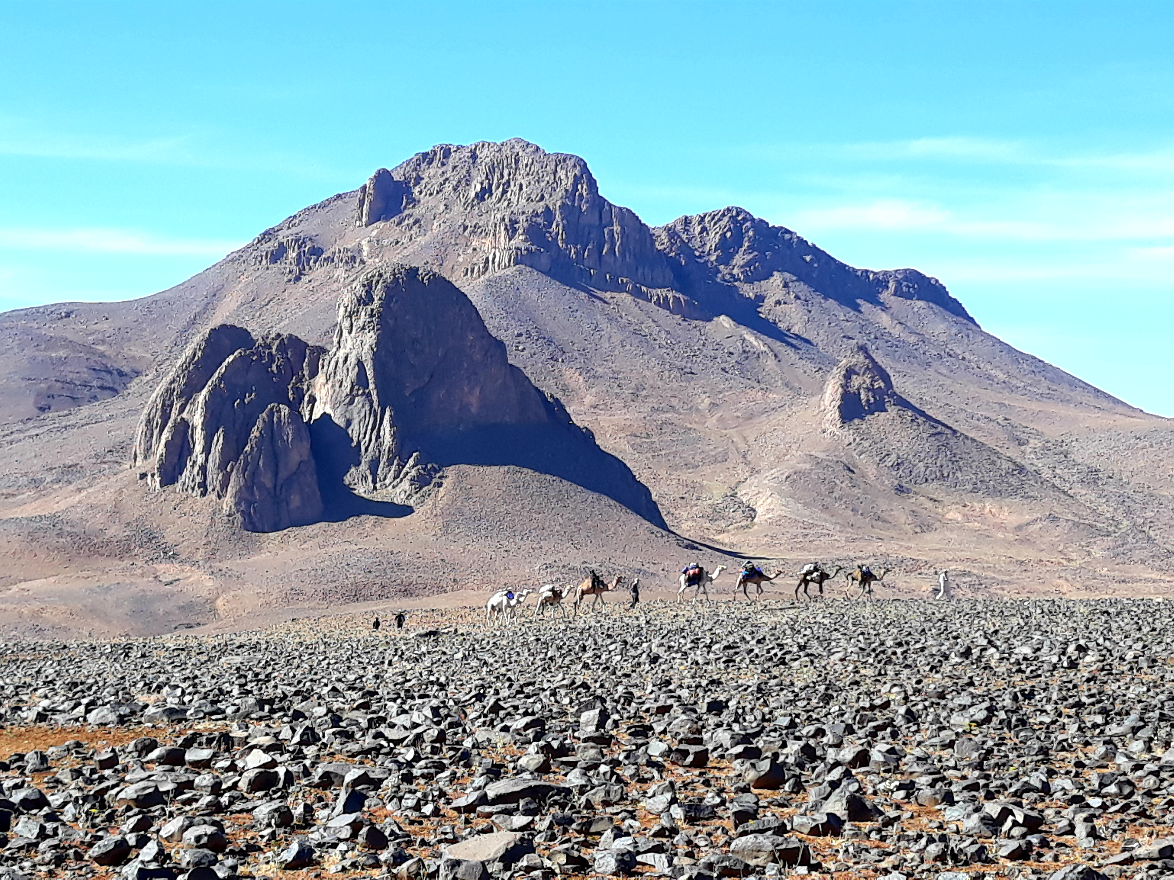 Mount Tahat : view from the east